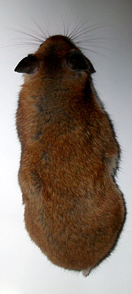 Chomik syryjski - odmiana golden